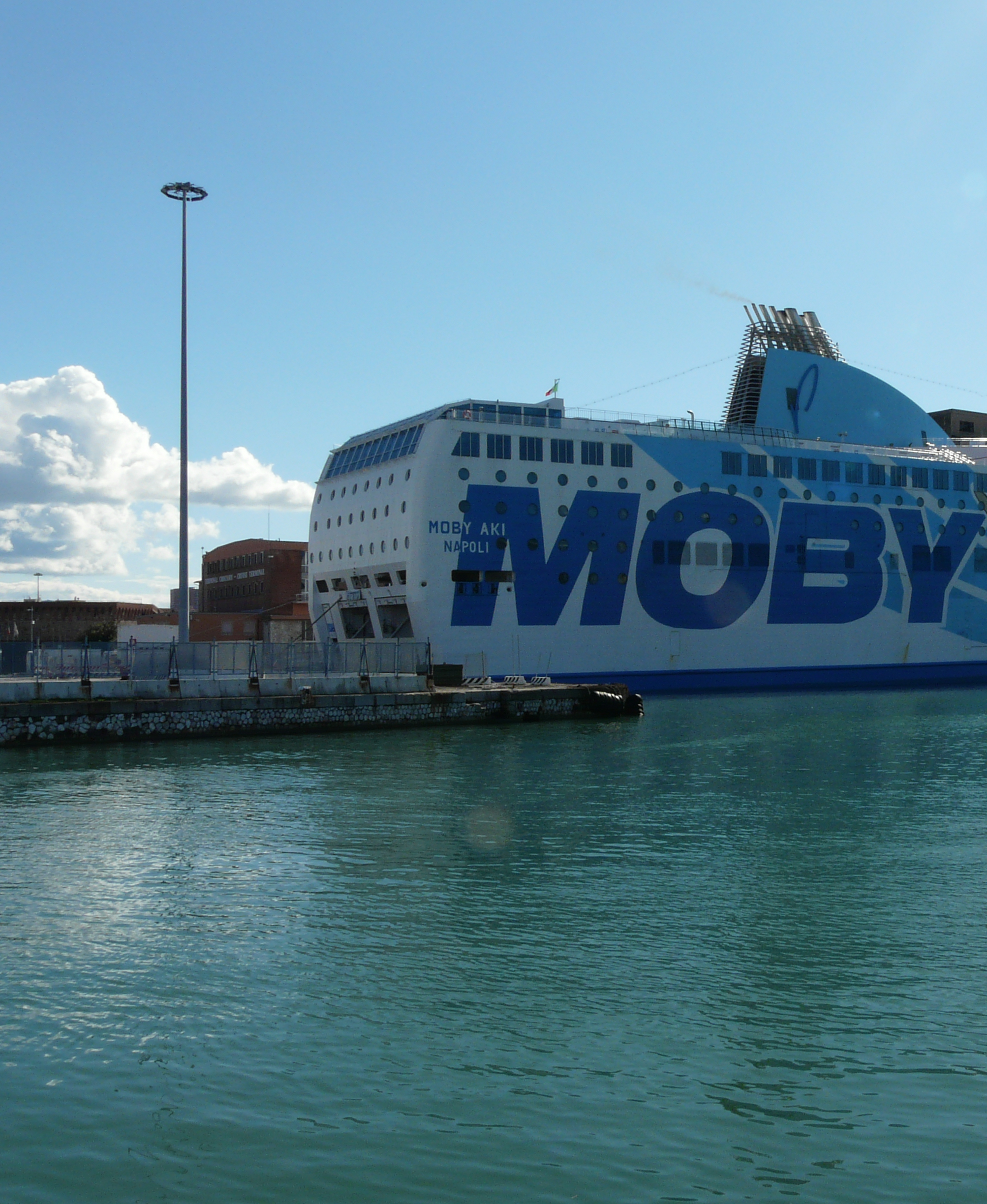 Пассажирский паром Moby Aki компании Moby Lines в порту Ливорно. Судно построено в 2005 году. Фото от 21/02/2007 года.Unknown